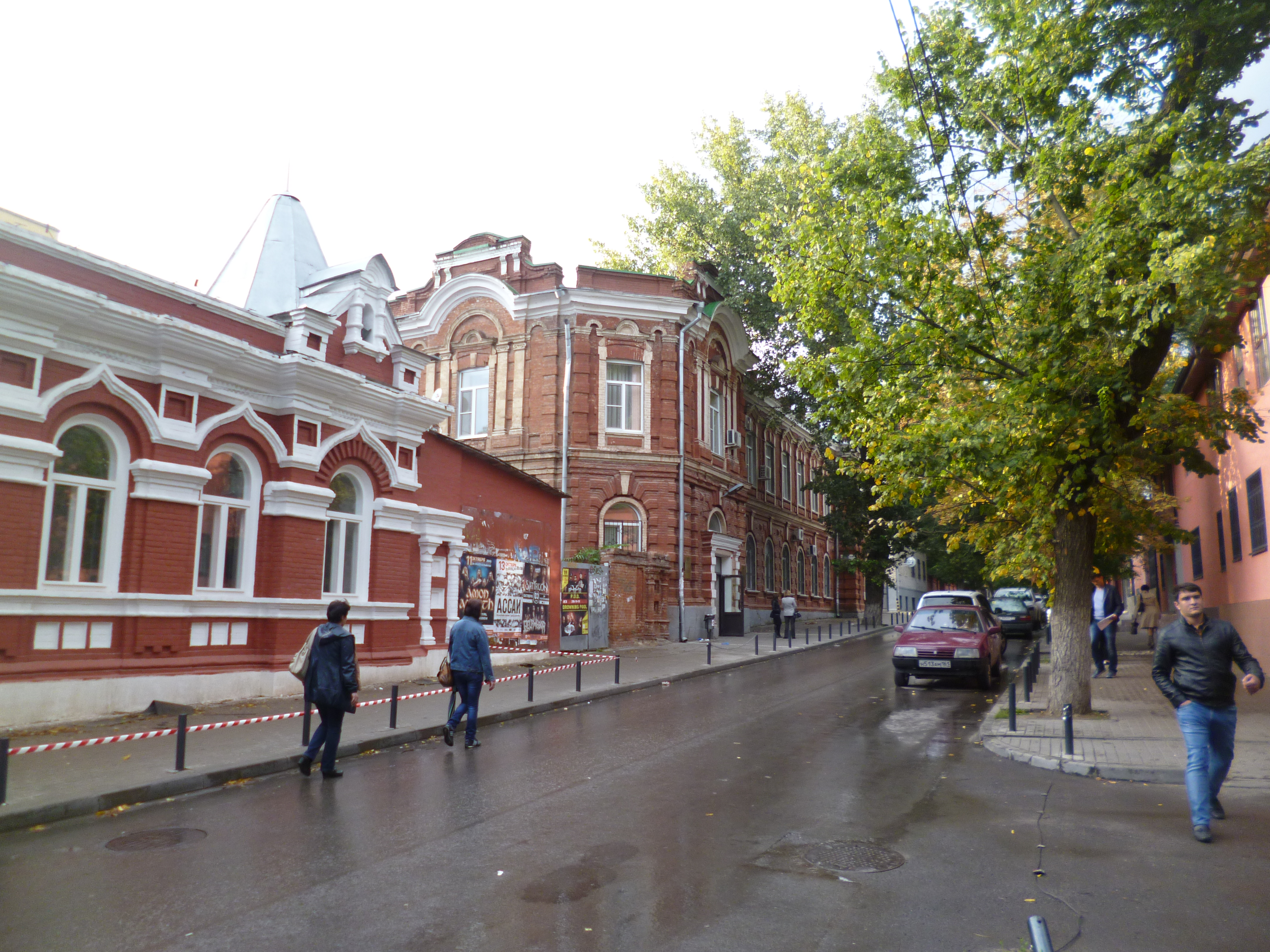 Здание дома трудолюбия максимова (Ростовская область, Ростов-на-Дону, нахичеванский переулок, 31) Построен в 1897 году, непосредственно рядом с домом располагались Владимирская церковь и ее приют(одноэтажное здание), в Первую мировую войну там находился госпиталь. Мастерские и приют функционировали до 1917 года. Сейчас это территория медицинского университета